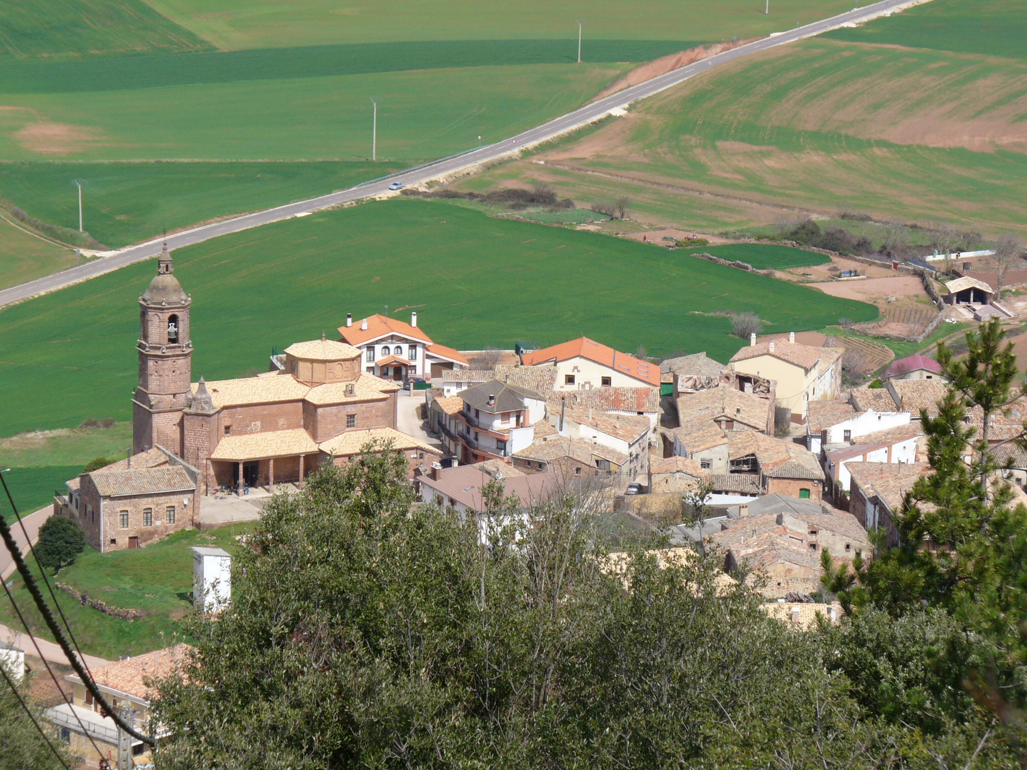 Sorladaren ikuspegia San Gregorio Ostiense basilikatik.